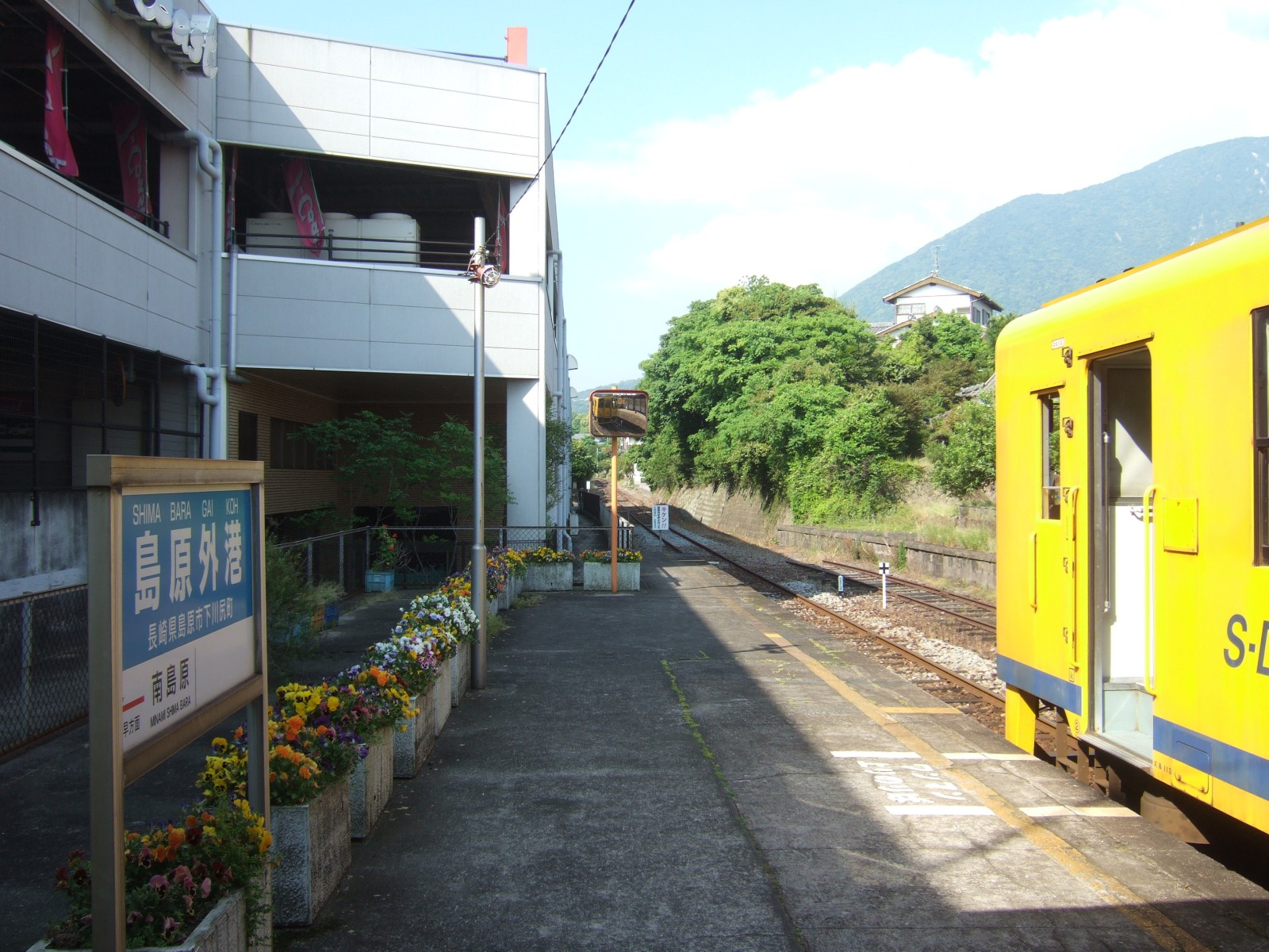 島原鉄道島原外港駅ホーム（廃線区間方向を望む）